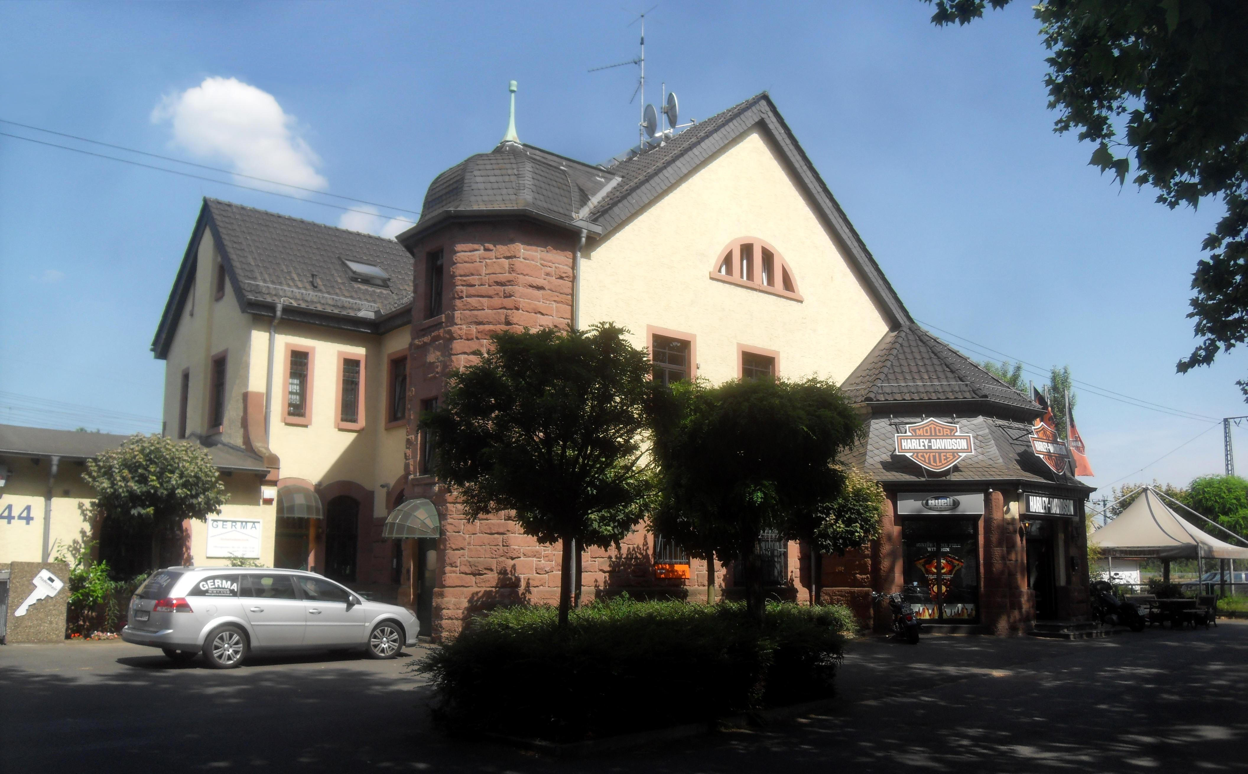 Das Bahnhofsgebäude und der Bahnhofsvorplatz des Bahnhofs Wiesbaden Ost in Hessen (Deutschland)